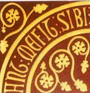 lorsqu'on creusa les fondations du presbytère en 1836 on trouva à 5 mètre de profondeur un carreau du XIVe siècle qui portait le nom du potier (Antonies) ainsi que l'inscription "fait pour moi-même).